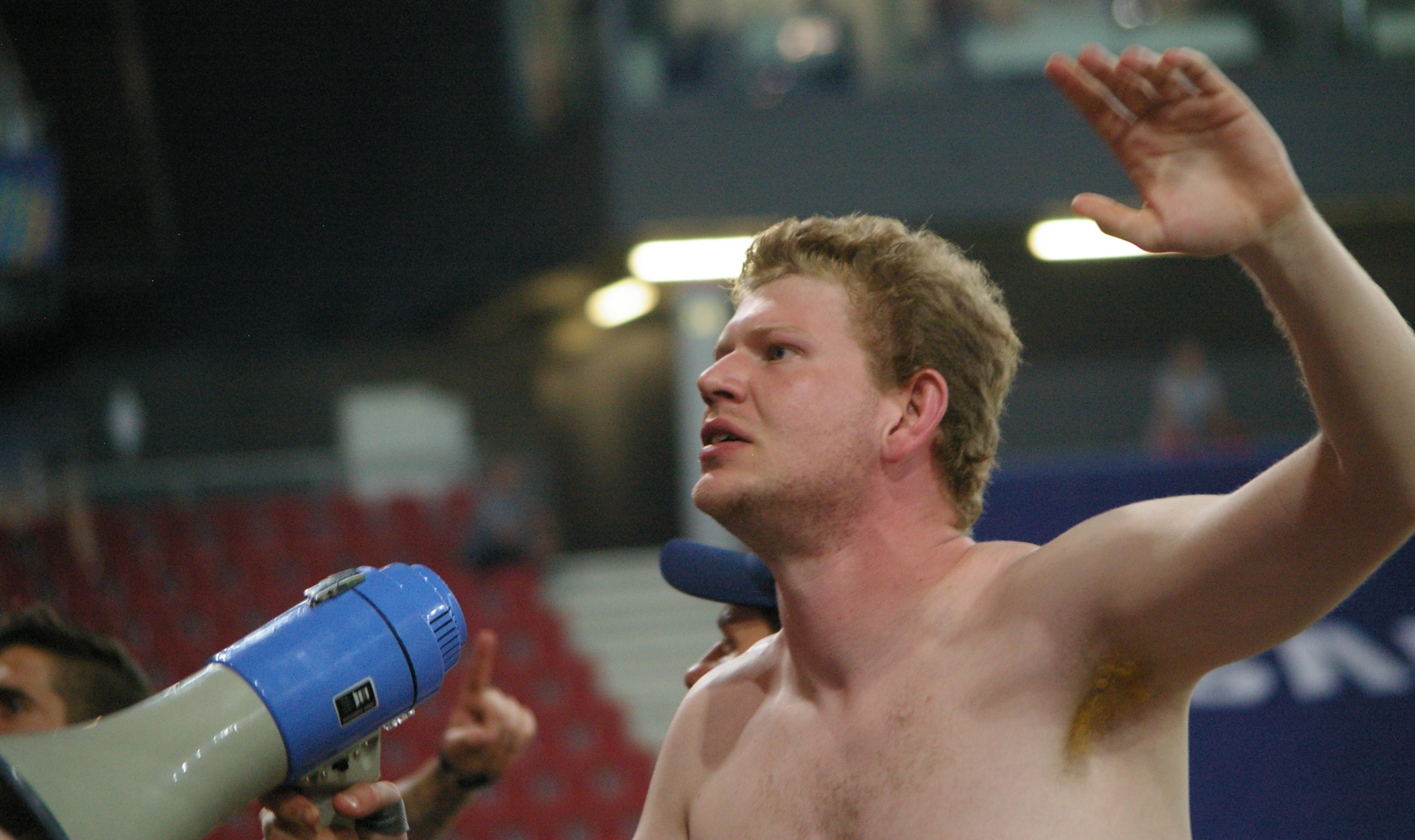 Österreichisches Cupfinale 3.6.2015 Klagenfurt FC Red Bull Salzburg gegen Austria Wien 2:0